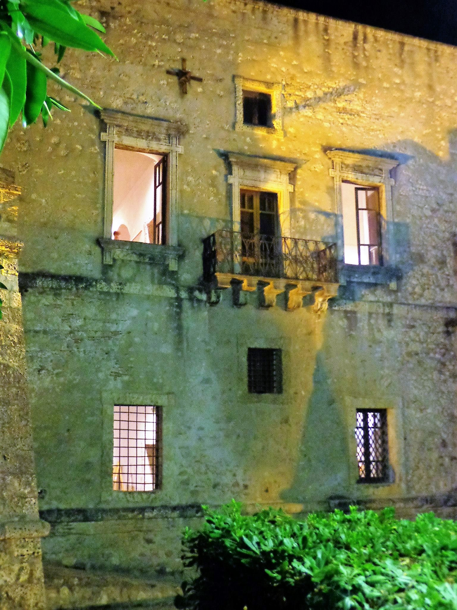 Castello Spadafora, esterno, Notte Bianca 28 07 2013, scatto già presente sulla pagina personale FB